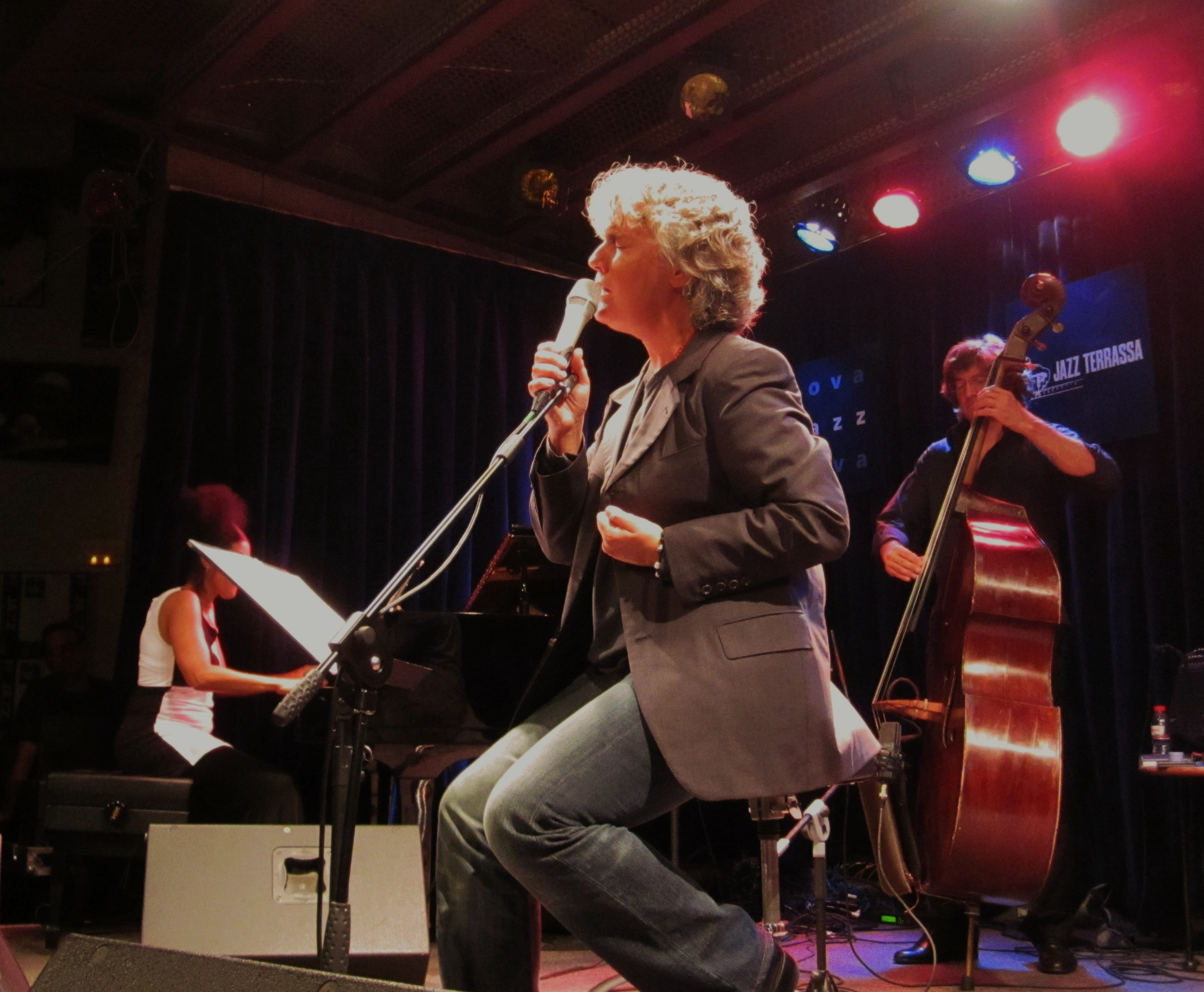 La cantaora Mayte Martín en concierto el 2 de julio de 2012 en la Nova Jazz Cava de Terrassa (Barcelona)